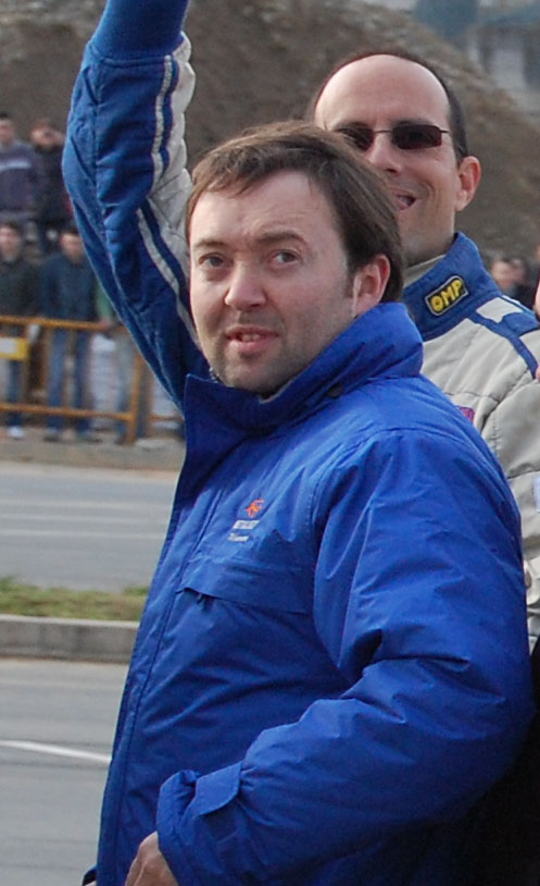 Luis Vilariño en 2008